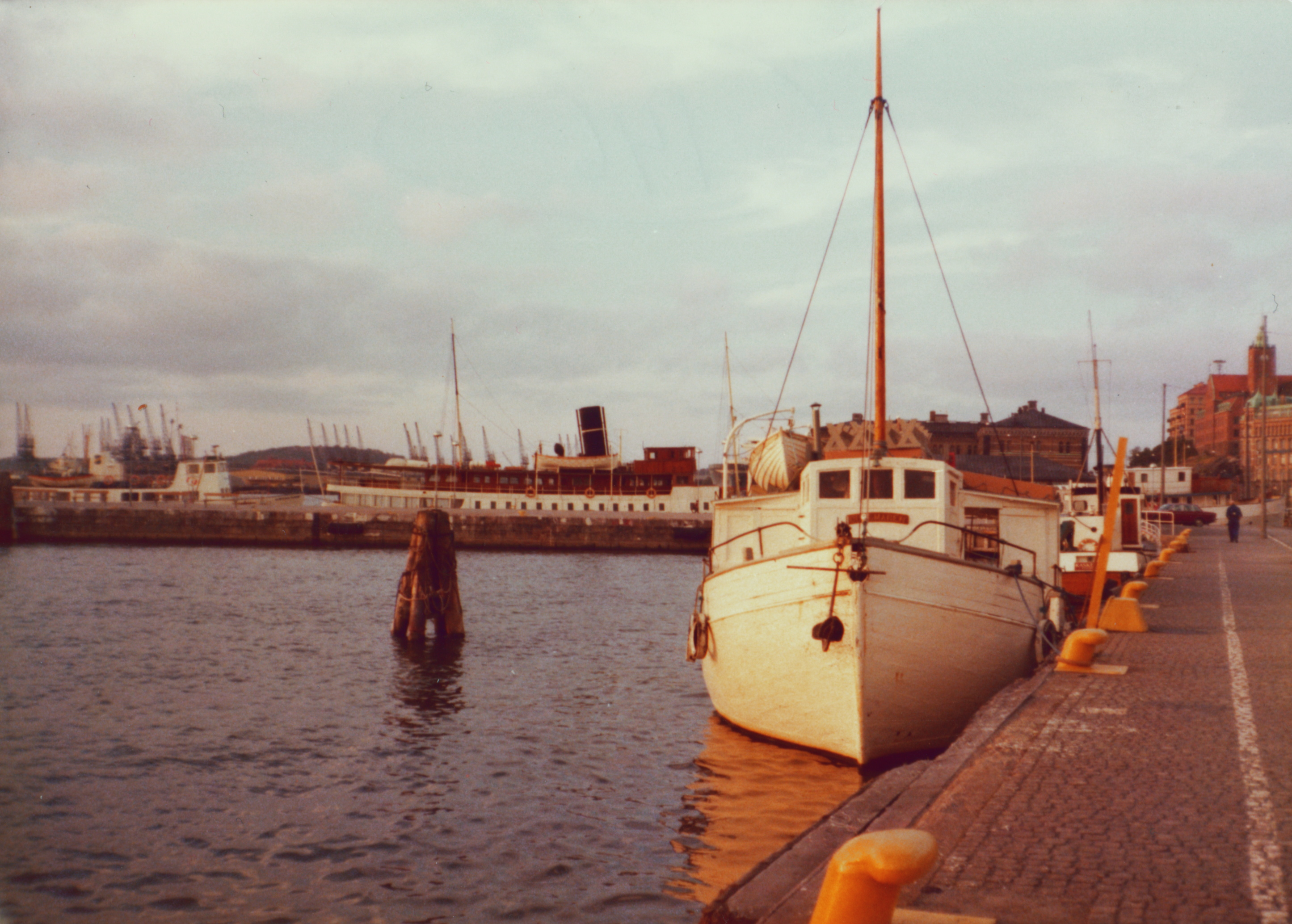 Skeppssbron 70 (ca 1974)